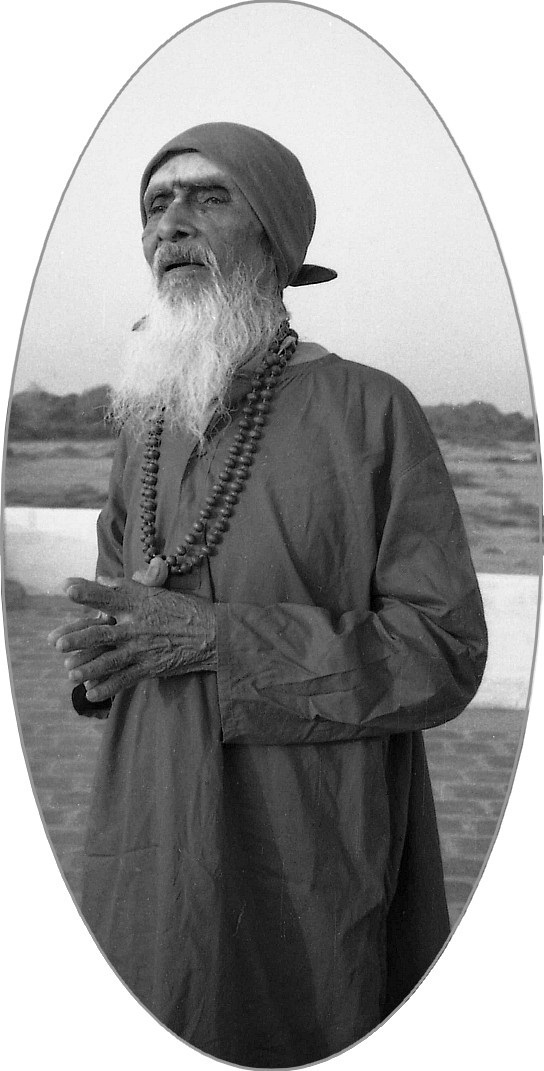 Kavi Yogi Maharishi Dr. Shuddhananda Bharati pris en photo en 1984 dans sa maison à Sholapuram